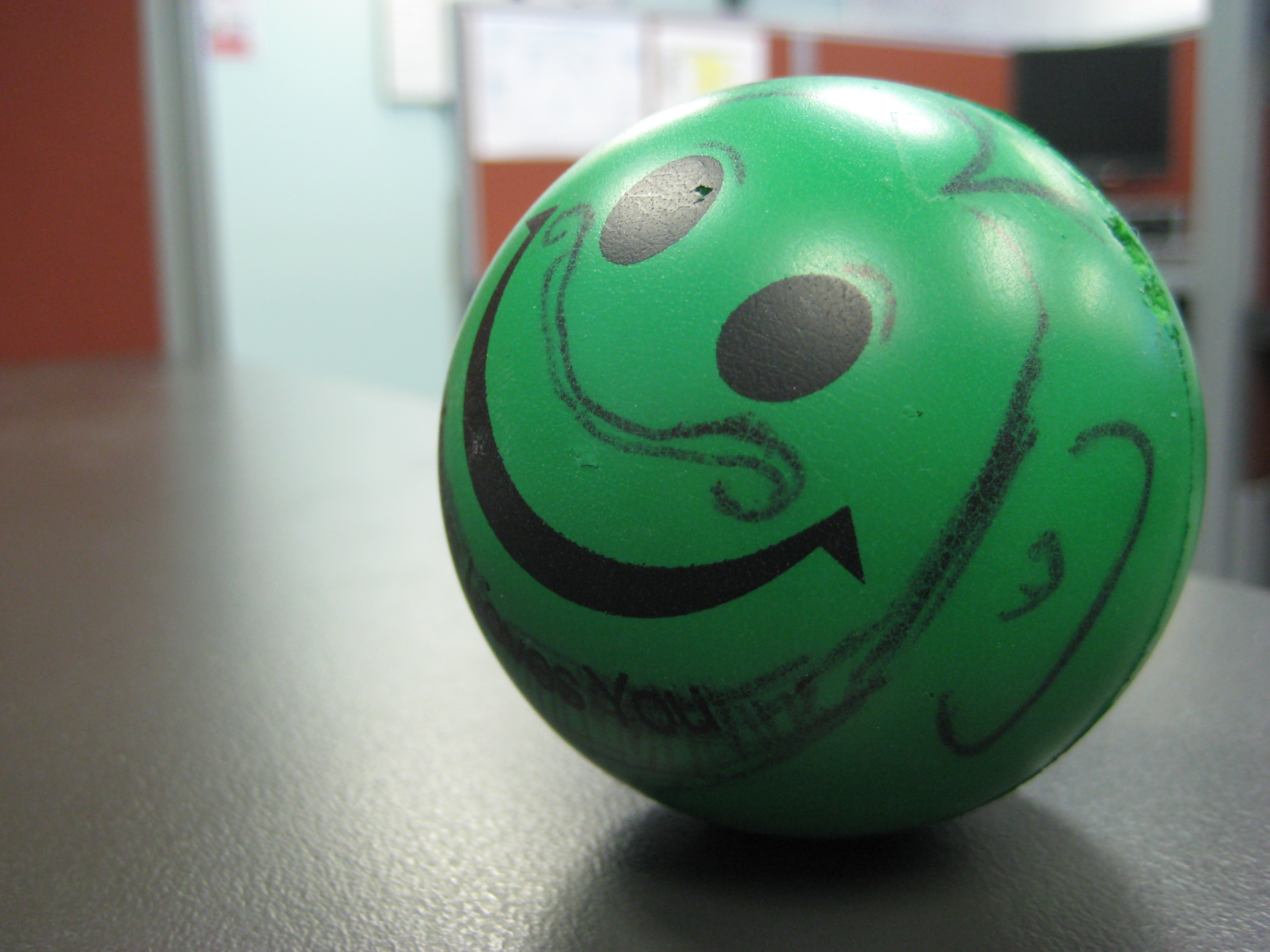 Hercule Poirot Stress Ball